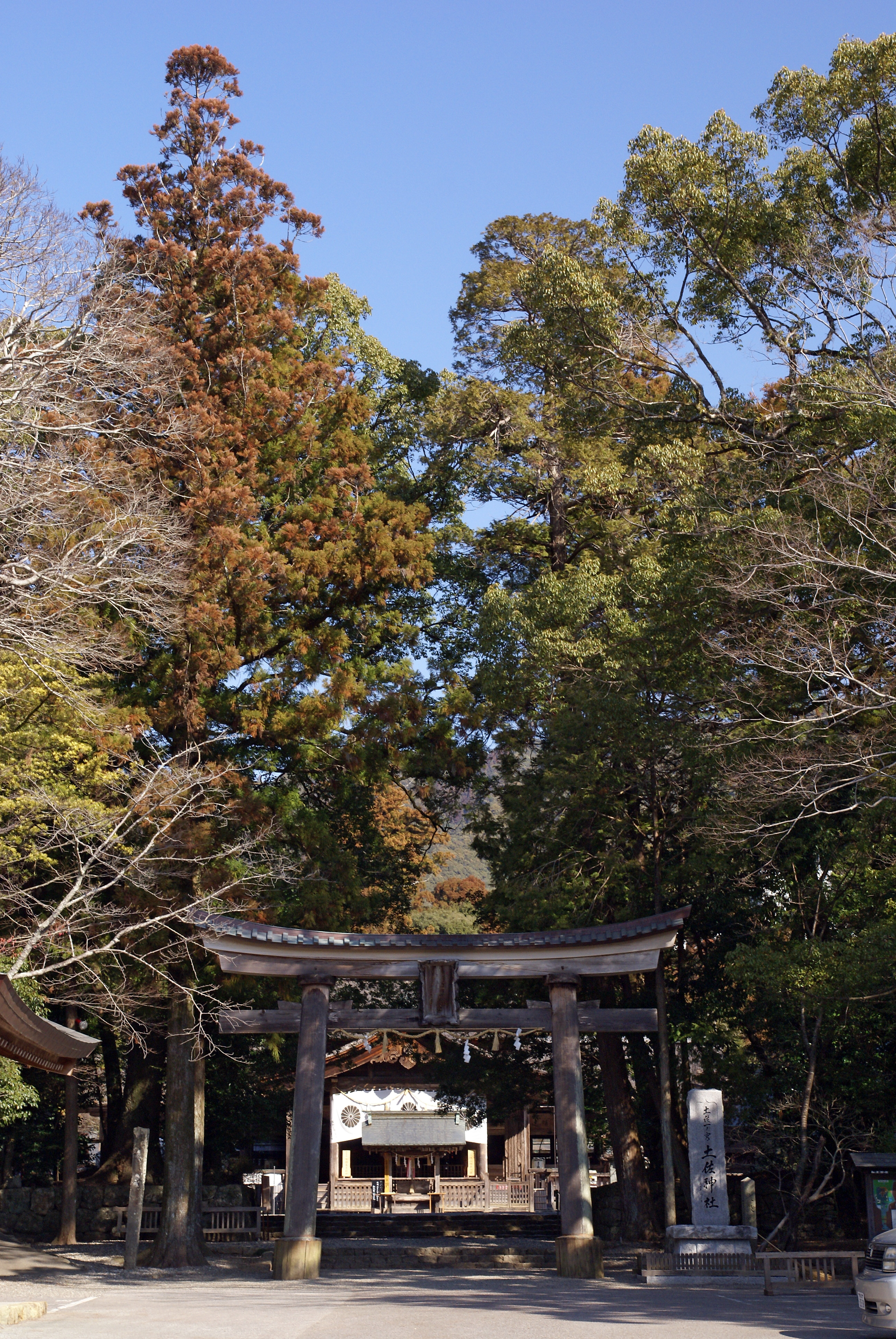 Tosa-jinja in Kochi, Kochi prefecture, Japan